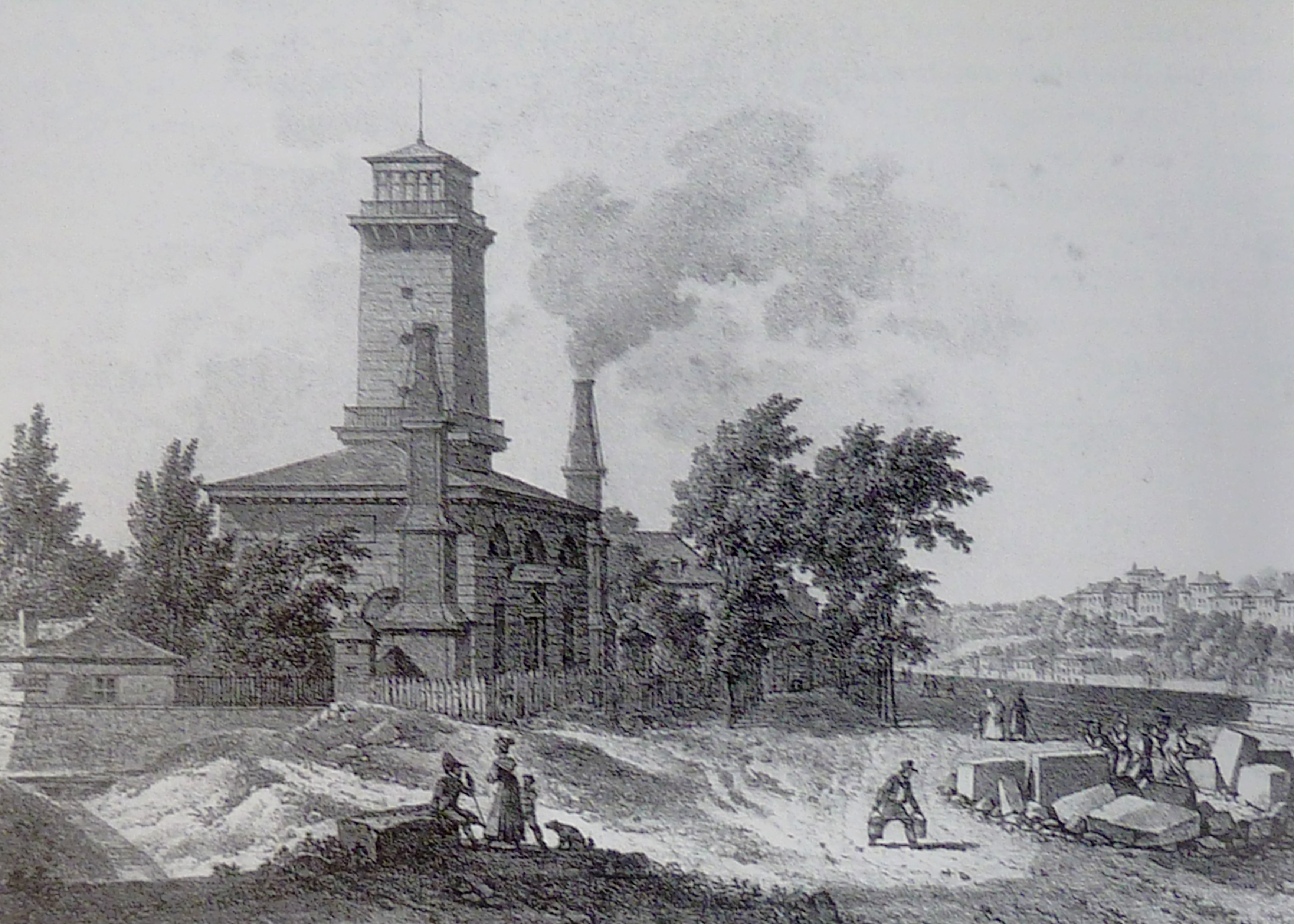 La Pompe à feu du Gros-Caillou, gravure, Bibliothèque historique de la Ville de Paris.